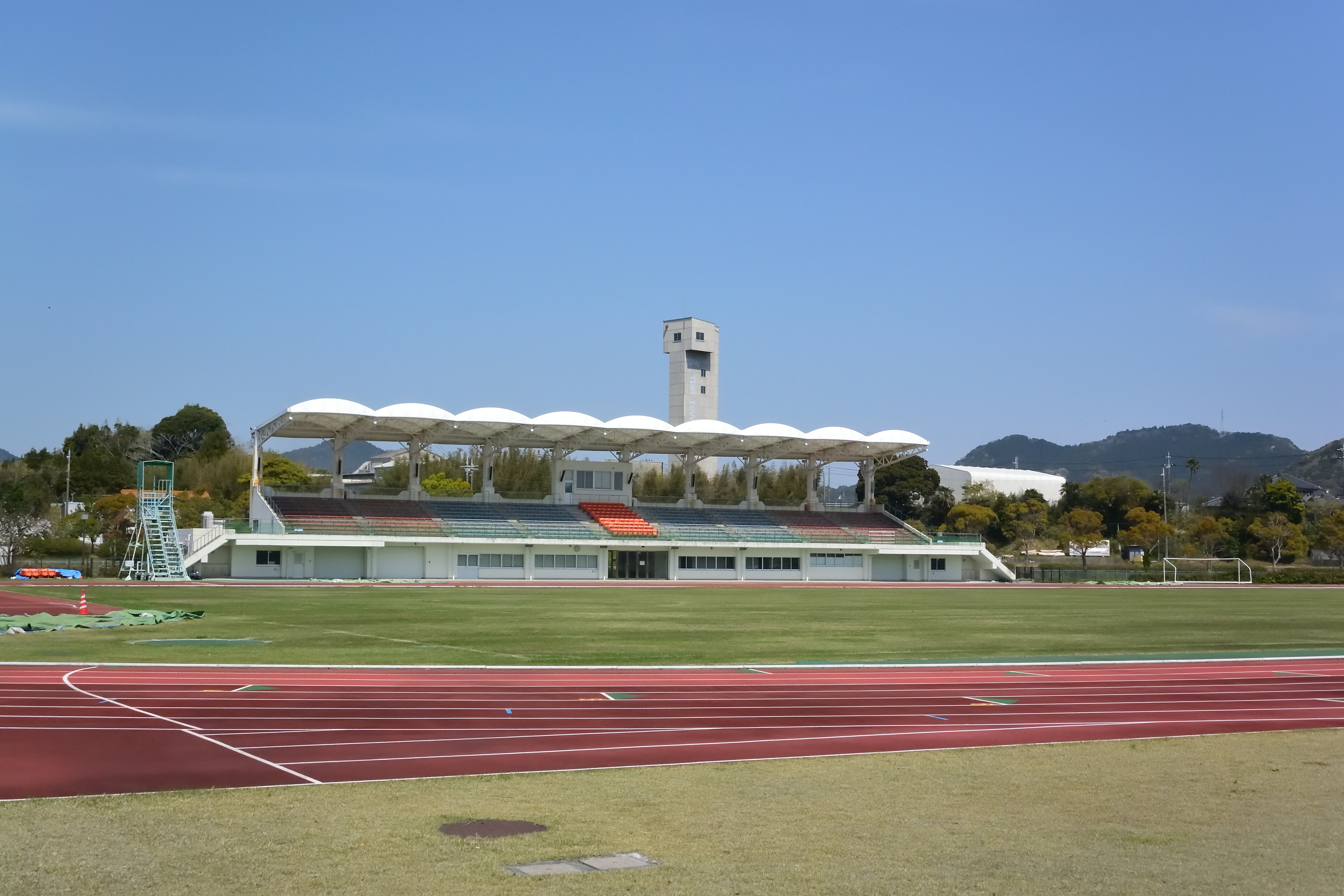 鴨川市陸上競技場